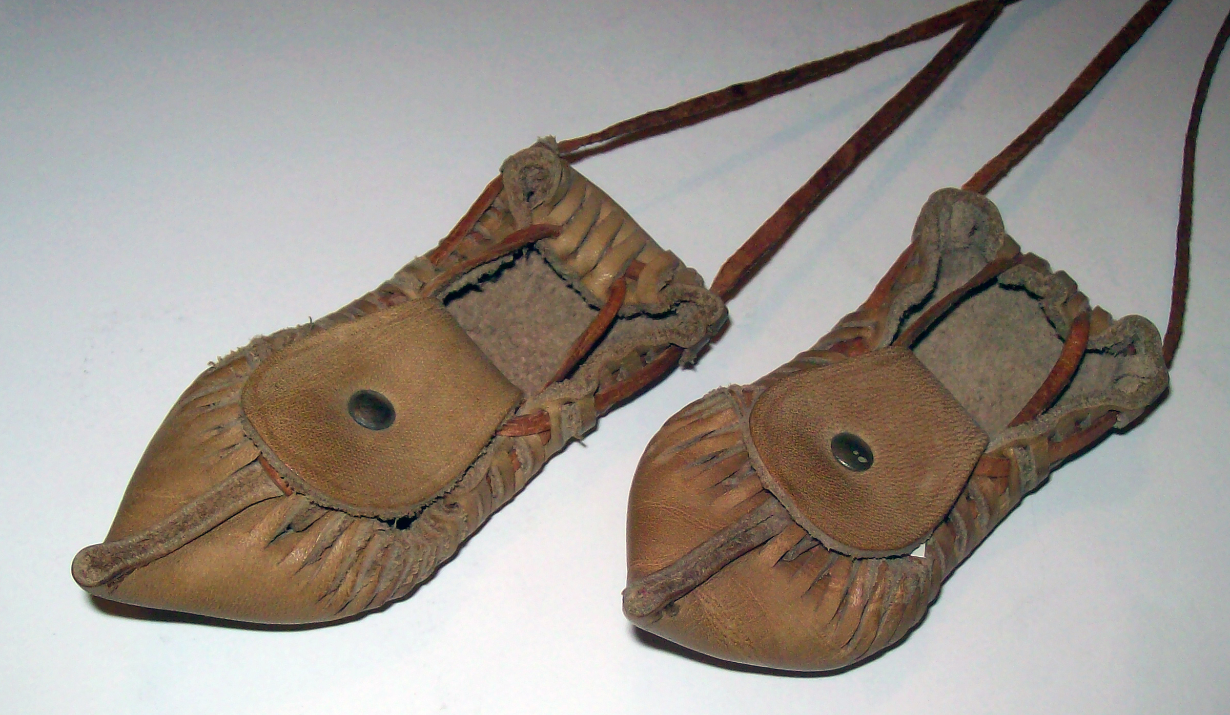 Цървули